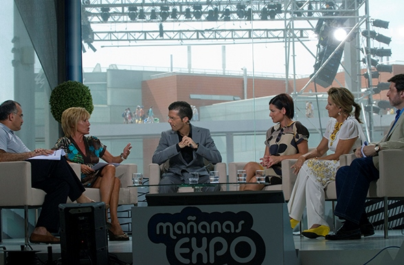 Mañanas Expo Programa de Aragón TV